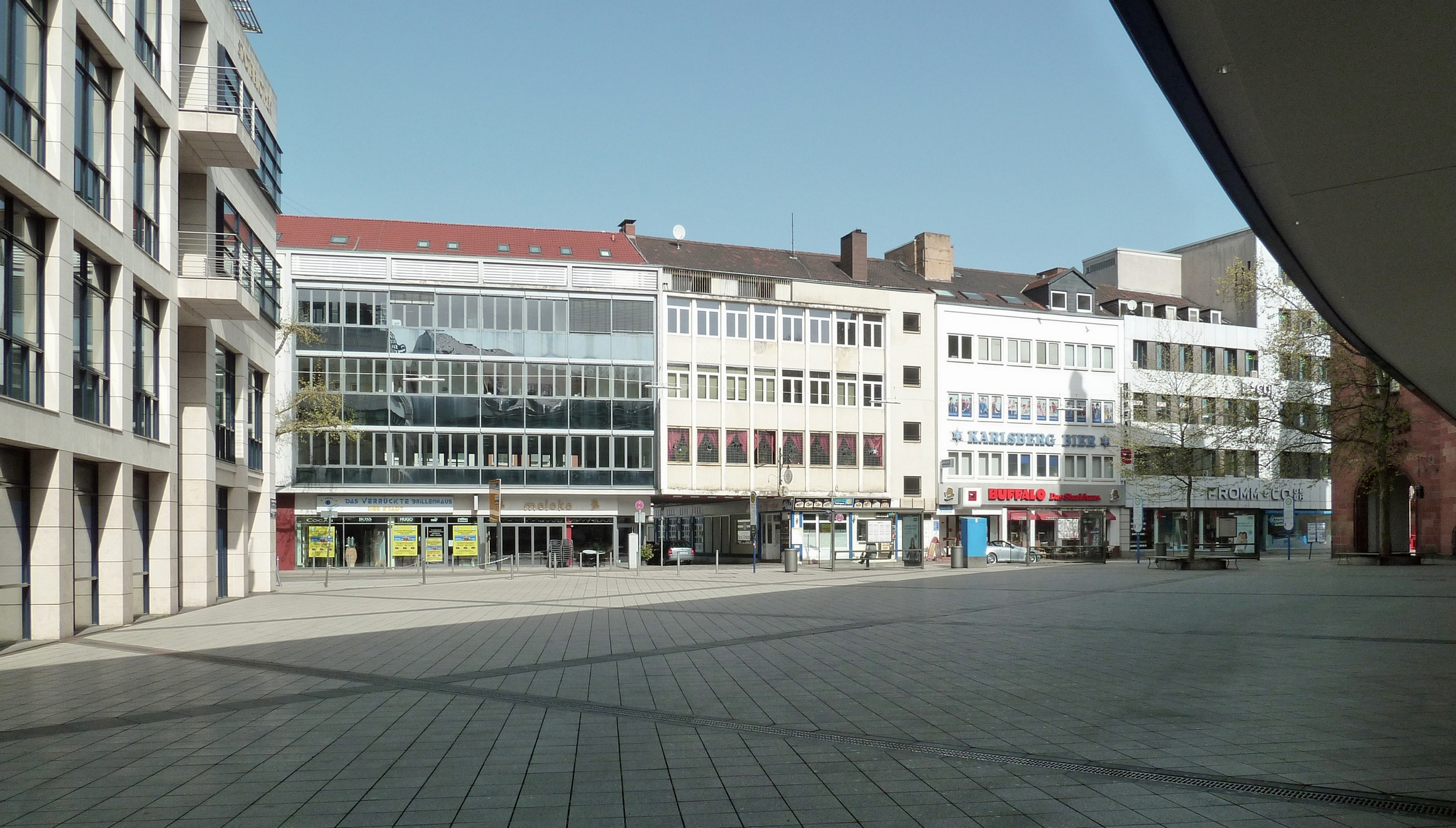 Der Gustav-Regler-Platz in Saarbrücken am Rathaus-Carrée.